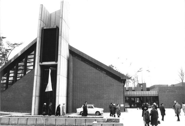 Schwerin, Großer Dreesch, katholisches Gemeindezentrum ADN-ZB Pätzold 30.11.1983-ad-Schwerin: Kirche eingeweiht-Das erste katholische Gemeindezentrum in einem Neubaugebiet Mecklenburgs wurde auf dem Großen Dreesch eingeweiht. Information added by Wikimedia users.St.-Andreas-Kirche auf dem Großen Dreesch, Bauabschnitt III (heute: Mueßer Holz) in Schwerin